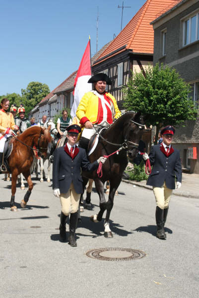 Schaubild anlässlich des historischen Festumzuges zum 775. Stadtjubiläum Wusterhausen/Dosse. Der Kyritzer Bürgermeister Hans-Joachim Winter als gelber Reiter.